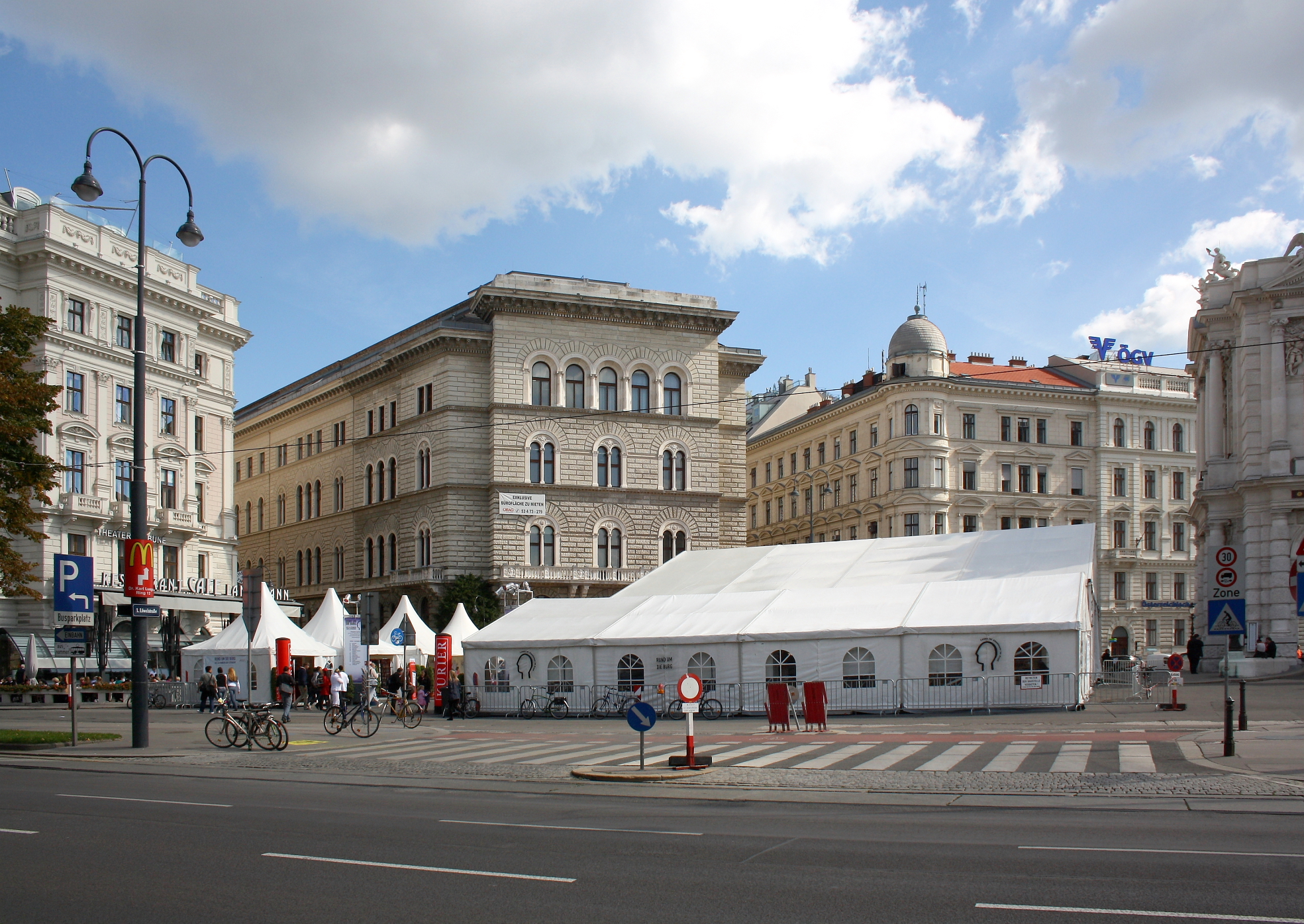 Das Zeltdorf des Literaturfestivals Rund um die Burg in Wien